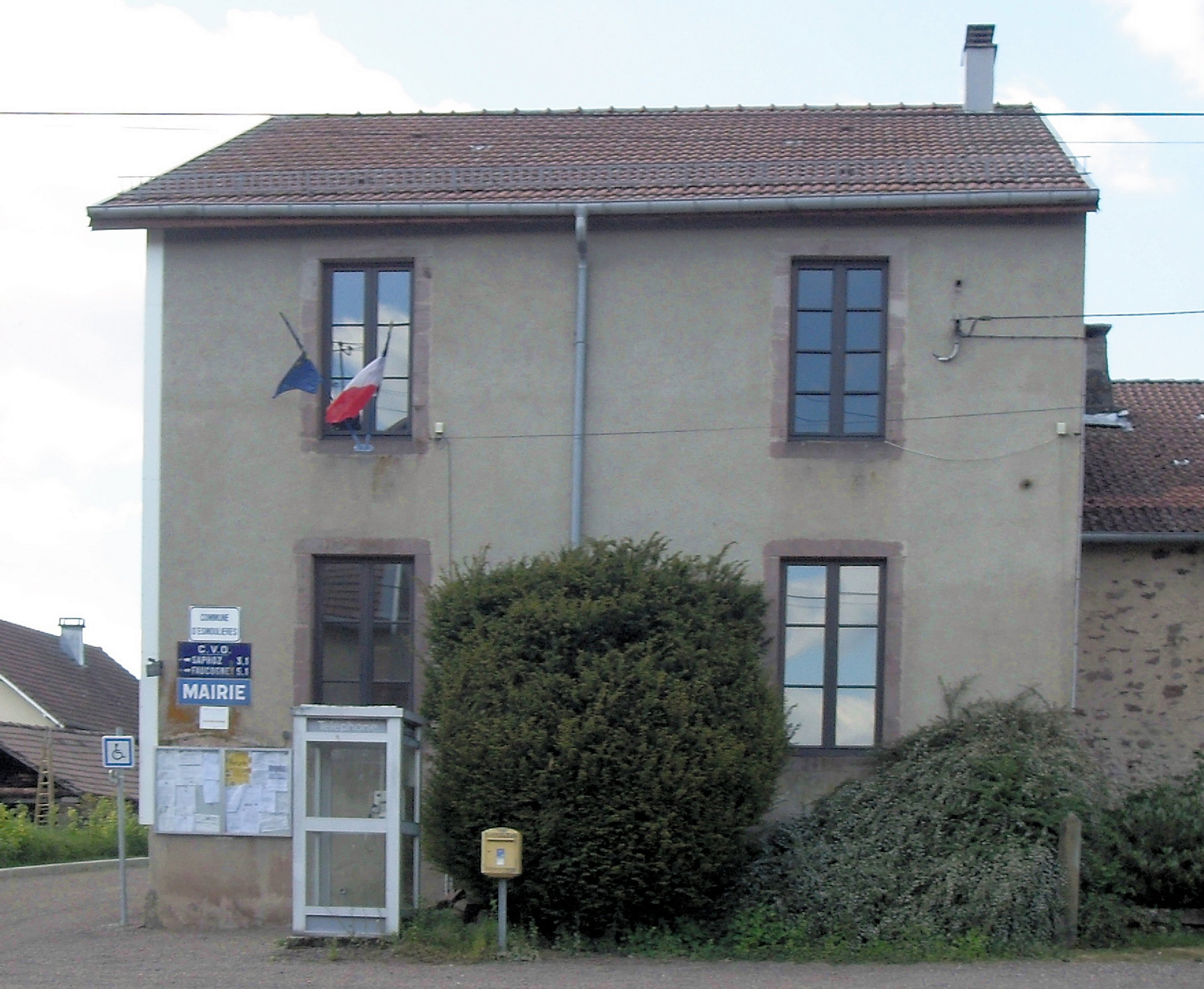 La mairie d'Esmoulières